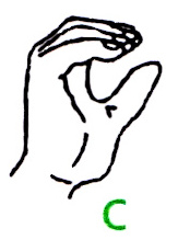 Buchstabe C im deutschen Fingeralphabet, gemäß einer Infokarte der Deutschen Gehörlosenhilfe Bayern e.V